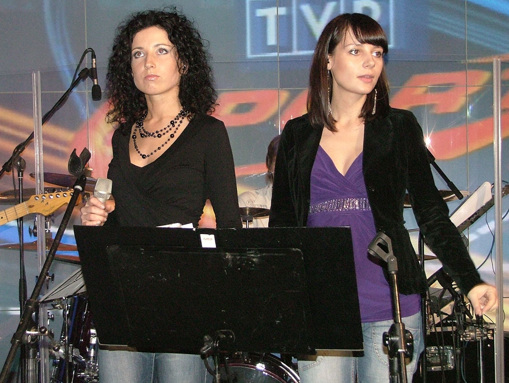 Impreza z okazji 1. urodzin TVP Sport, Warszawa, Centrum Olimpijskie chórek "Jaka to melodia": Agata Dąbrowska i Aneta Figiel-Murawska.